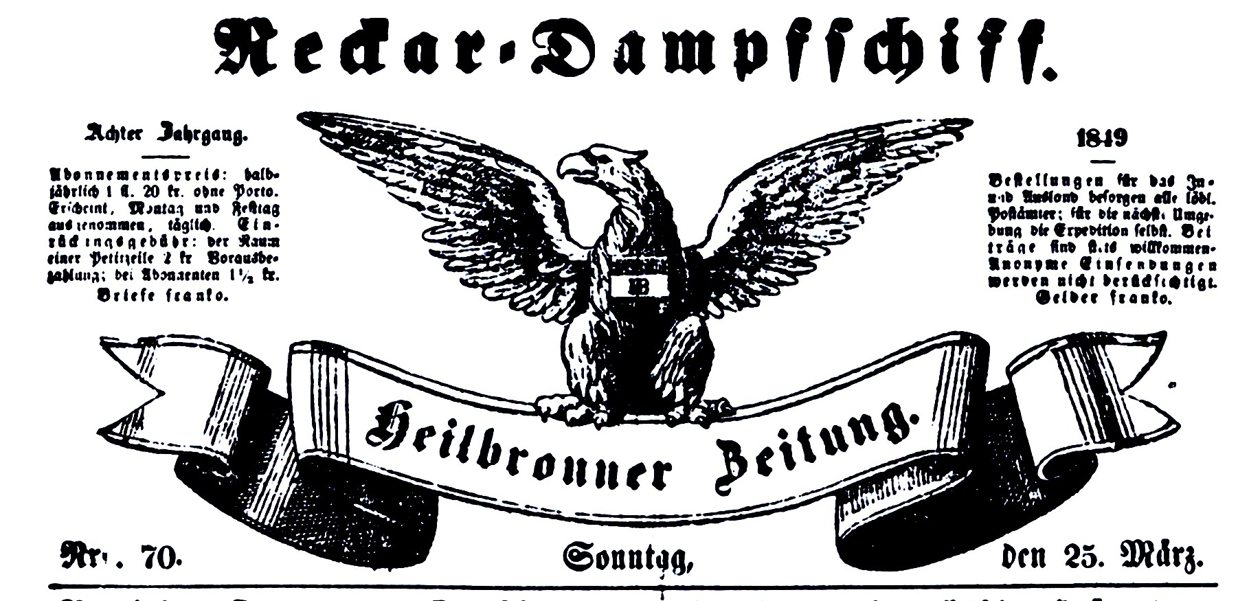 Titelkopf der Heilbronner Zeitung Neckar-Dampfschiff